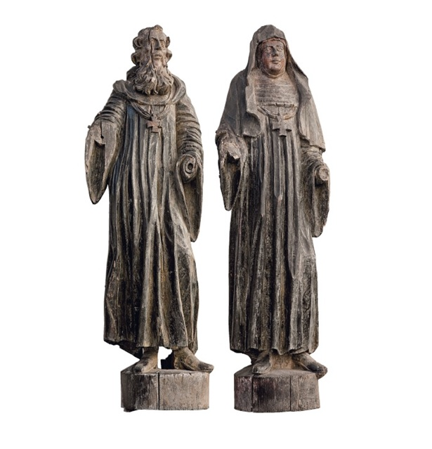 Šv. Benedikto Nursijiečio ir jo sesers šv. Skolastikos statulos stovėjusios Vilniaus Šv. Kotrynos bažnyčios fasade. XVIII a. vid., Bažnytinio paveldo muziejus